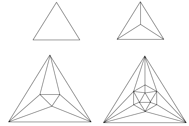 As quatro possibilidades de divisão do triângulo em outros menores.